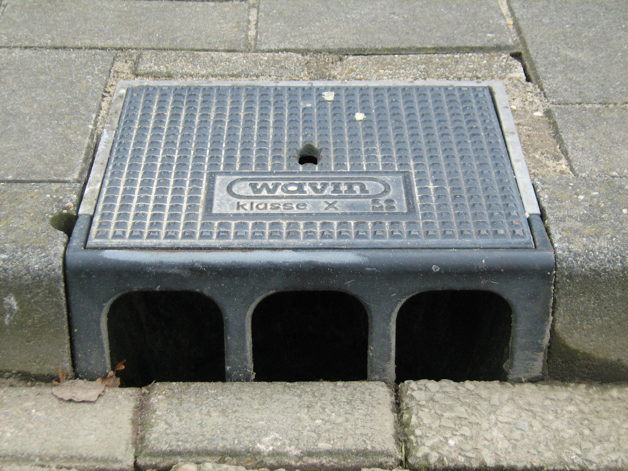 Trottoirkolk/Drain in sidewalk